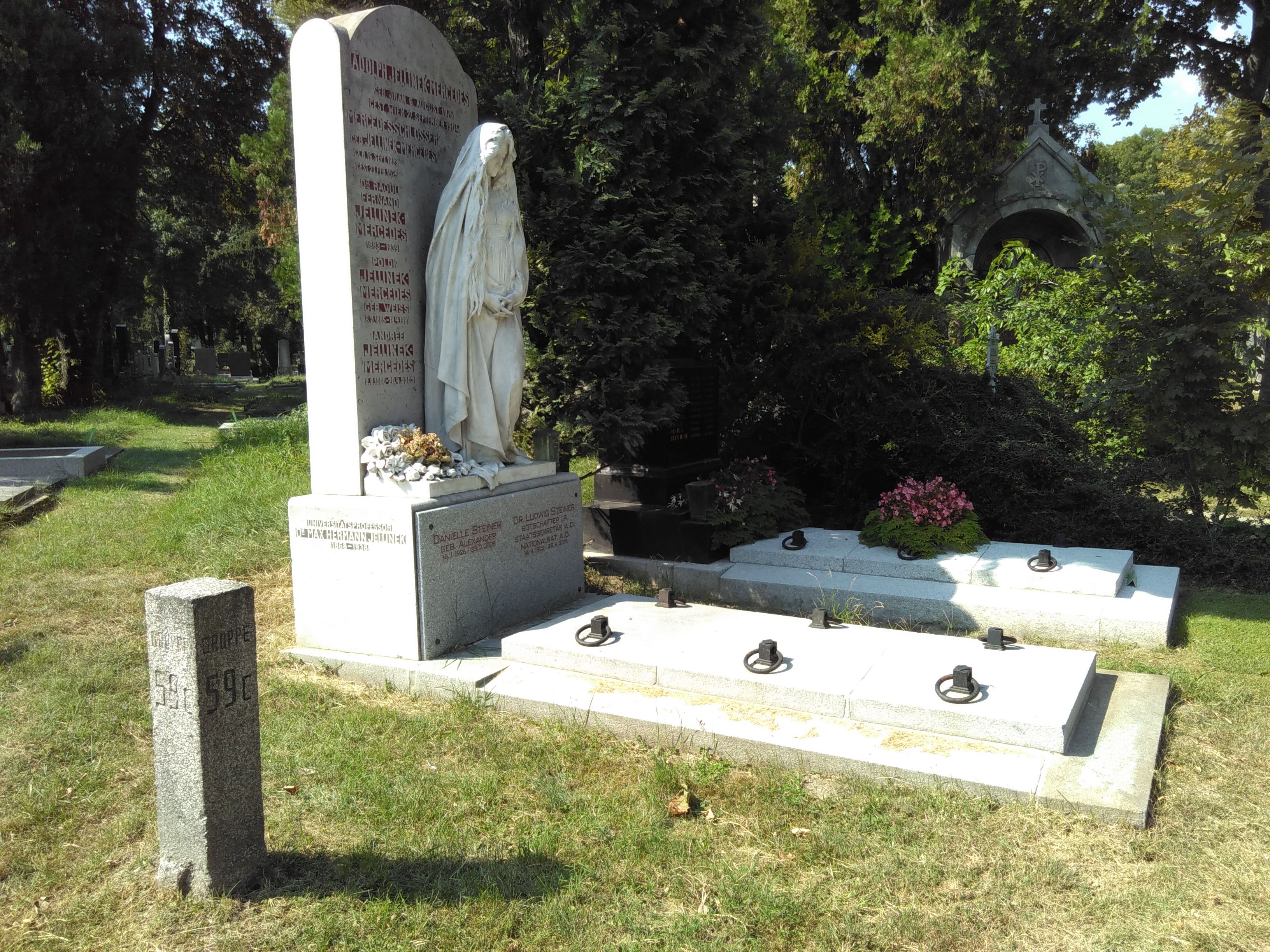 Grab der Familie Jellinek-Mércedès am Wiener Zentralfriedhof. Hier liegen unter anderem Mercédès Jellinek, Max Hermann Jellinek, Raoul Fernand Jellinek-Mercedes und Ludwig Steiner begraben (Tor 2, Gruppe 59C, Nr. 26)